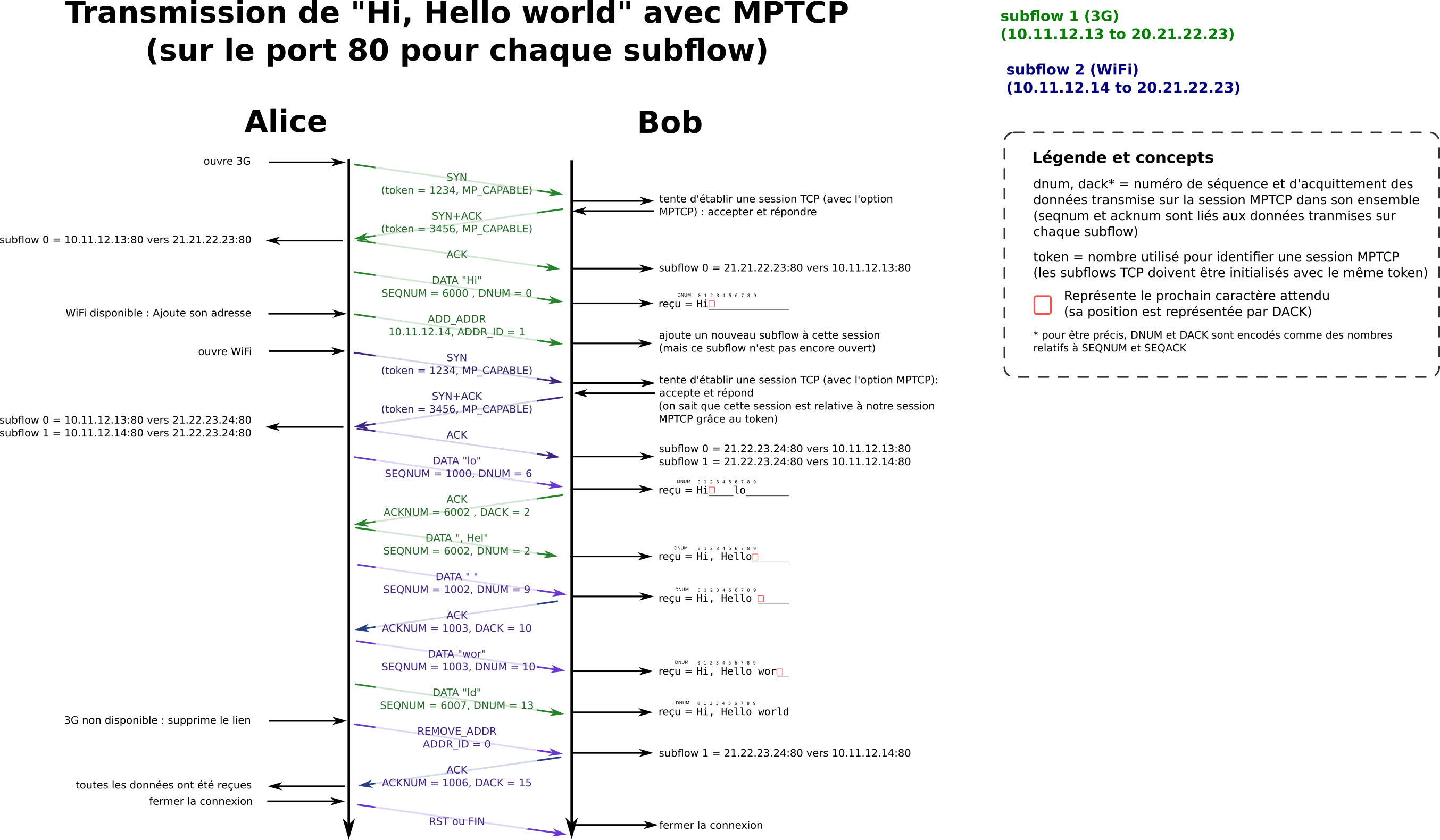 Illustration d'une session MPTCP complète. Celle-ci décrit une situation où Alice envoie des données à Bob. Alice commence avec son 3G activé, puis active le WiFi et ensuite, perd la connectivité 3G.